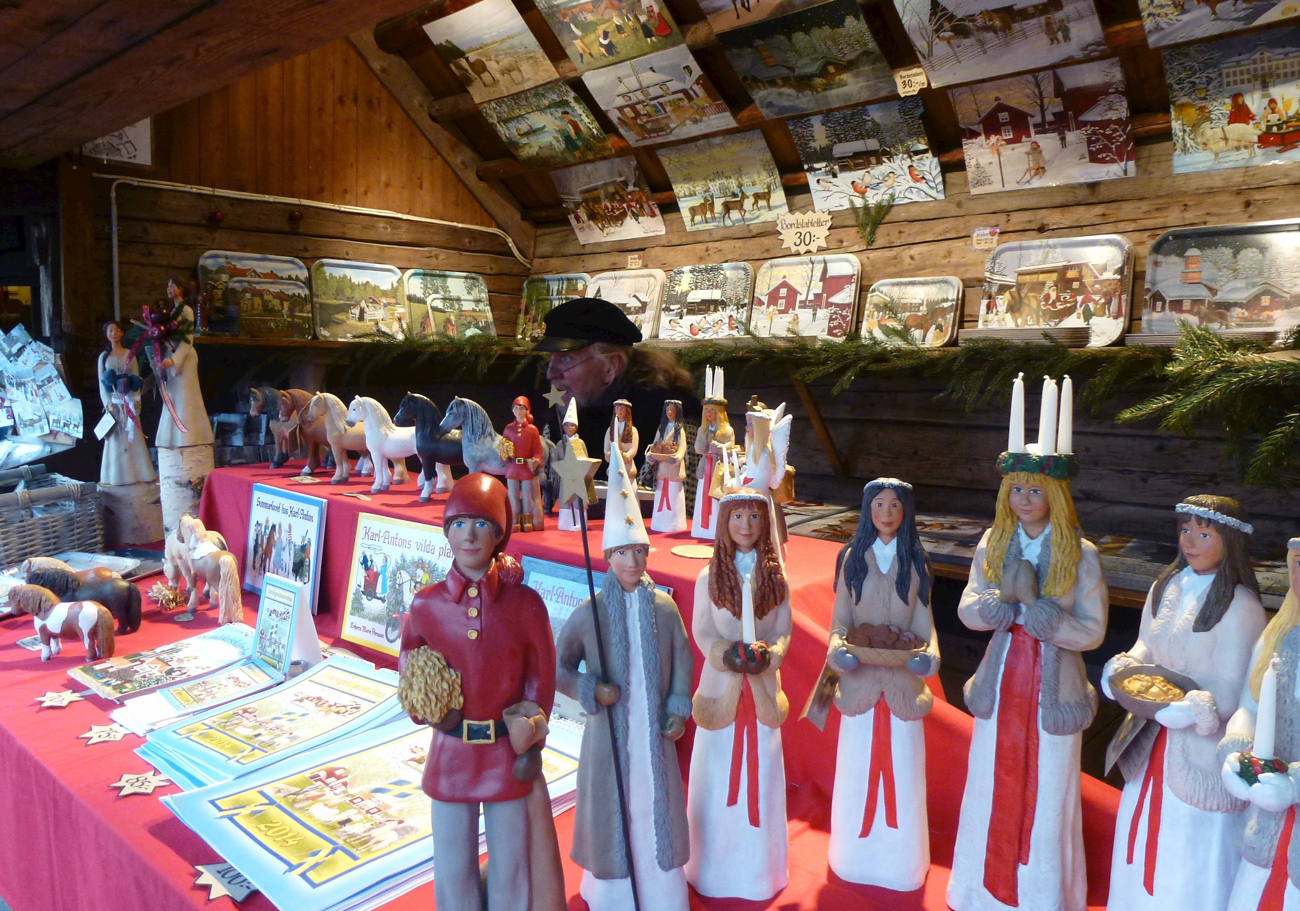 Skansens julmarknad 2013